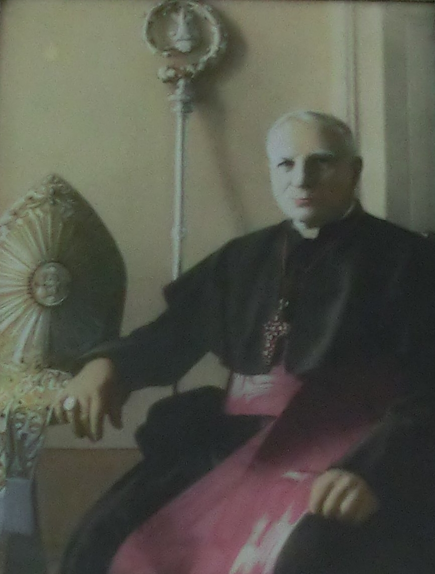 Ludvík Gala, 14. arciděkan v Horní Polici, na kolorované fotografii.